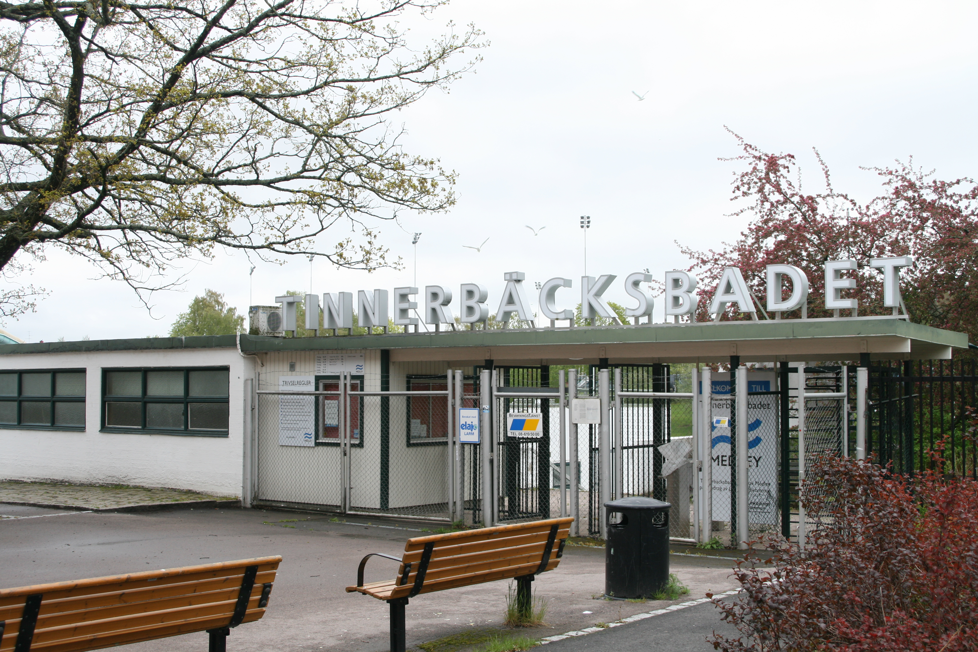 Tinnerbäcksbadet, Linköping, entrén